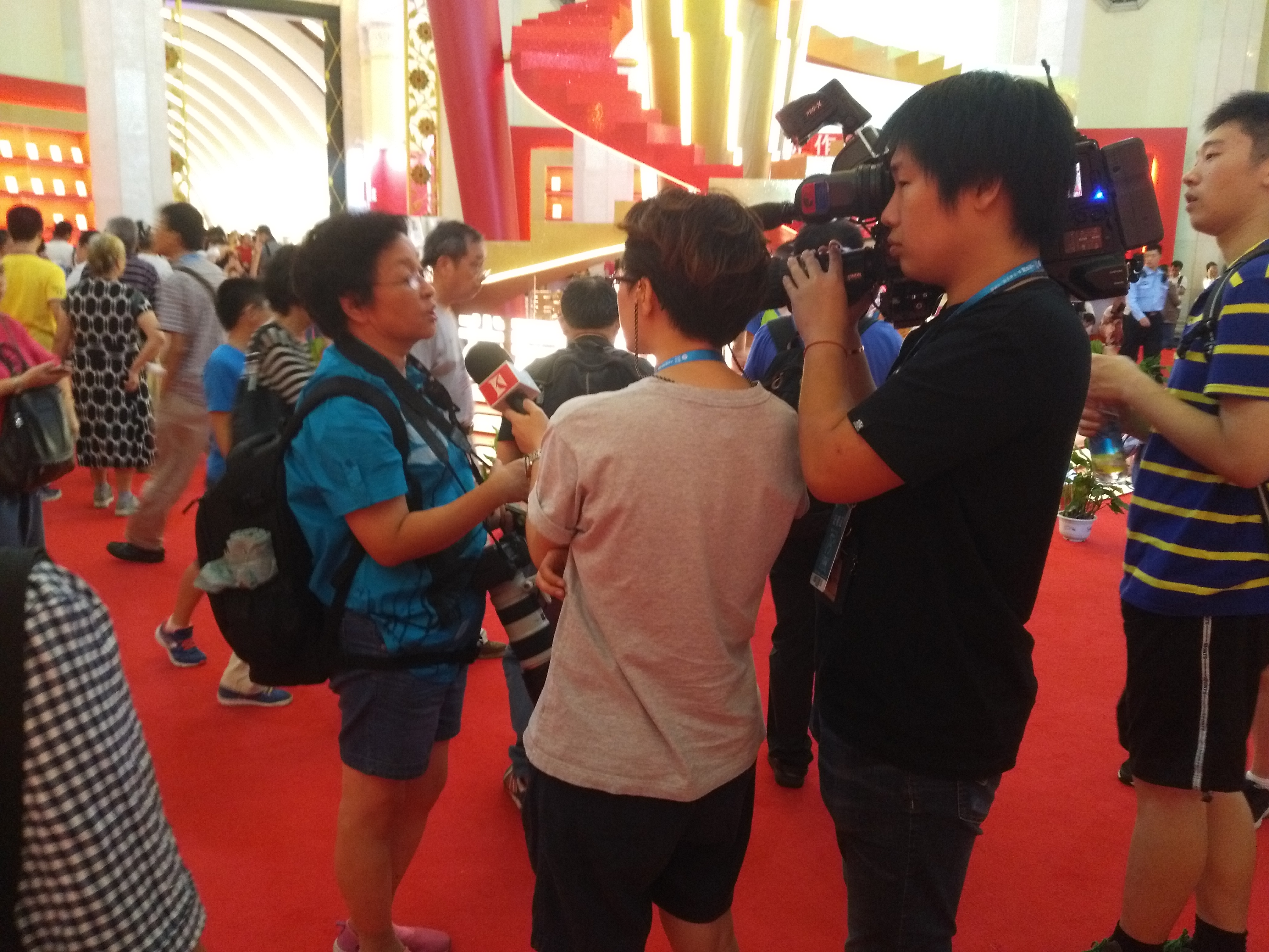 2018上海书展，读者正接受上海广播电视台记者采访。